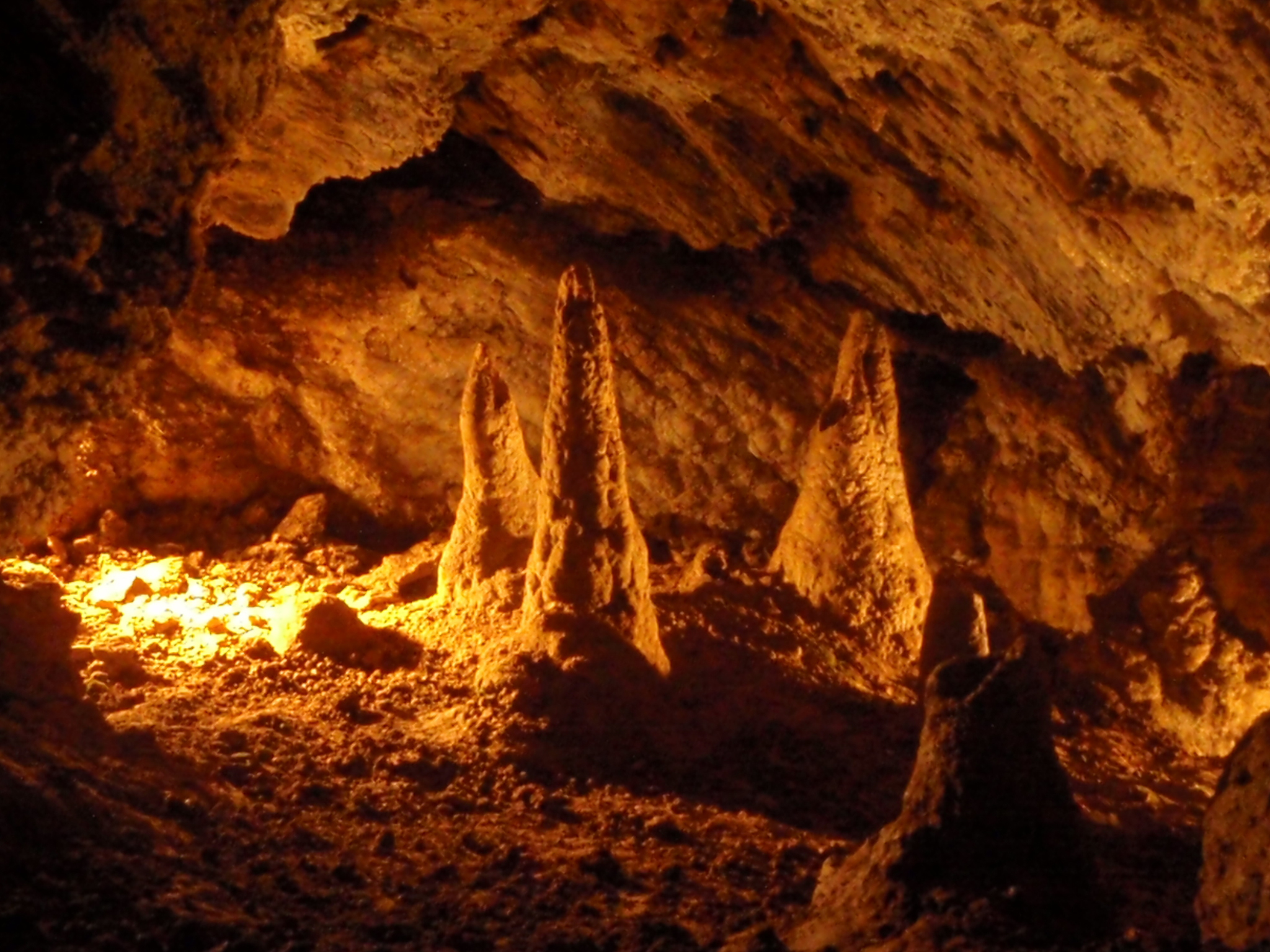 Gejzírové stalagmity